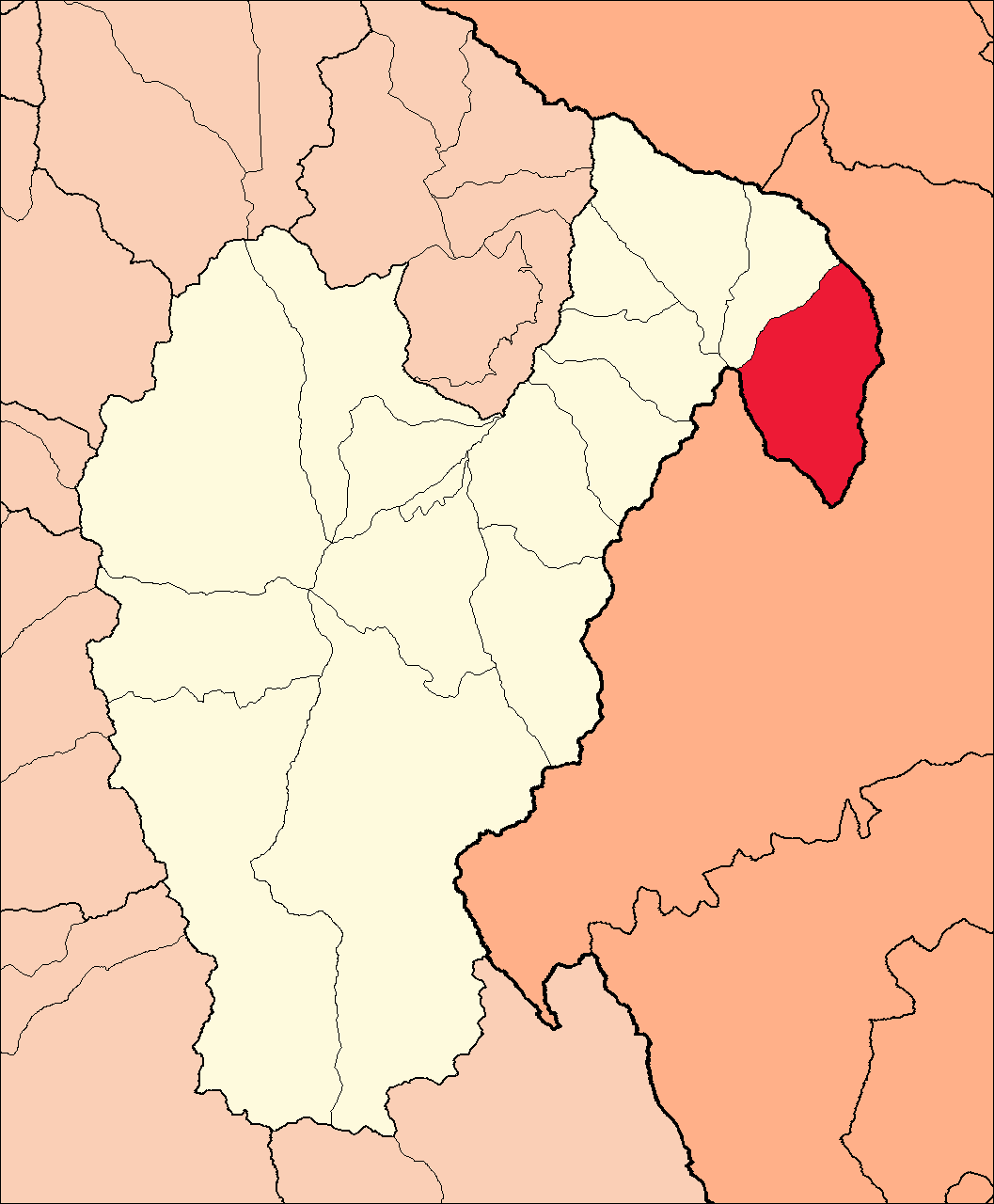 Área del distrito de Rapayán dentro de la provincia de Huari.